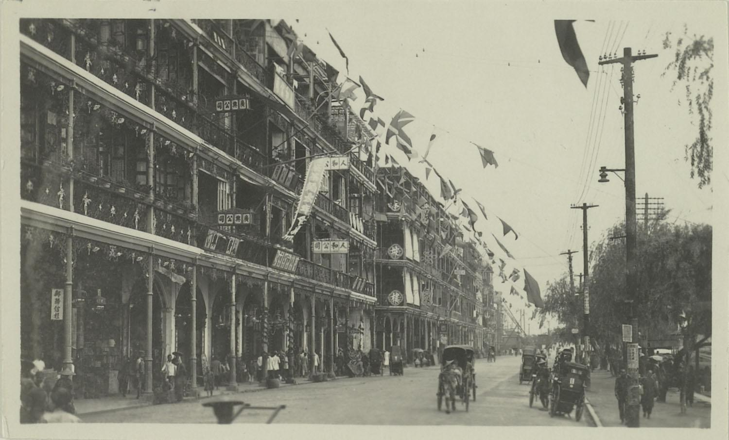 1920年代，廣州市東堤。